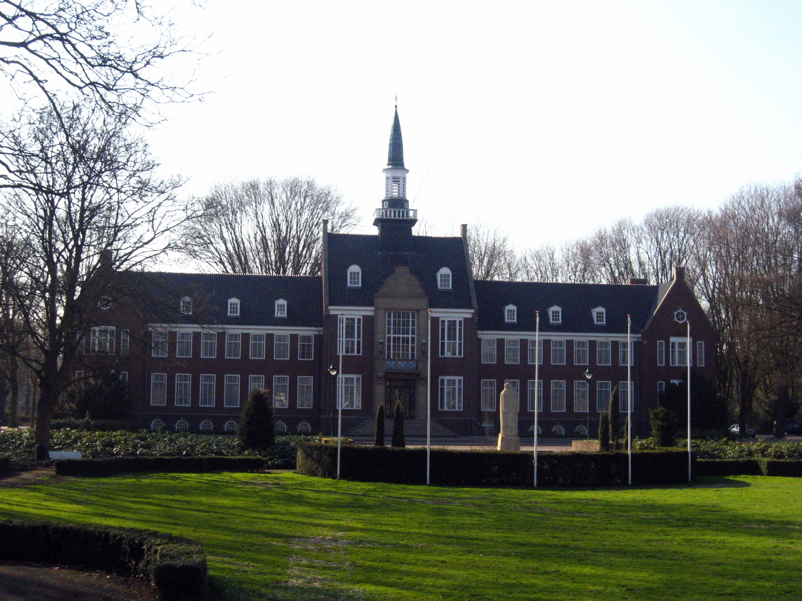 Burgemeester Visserpark 28